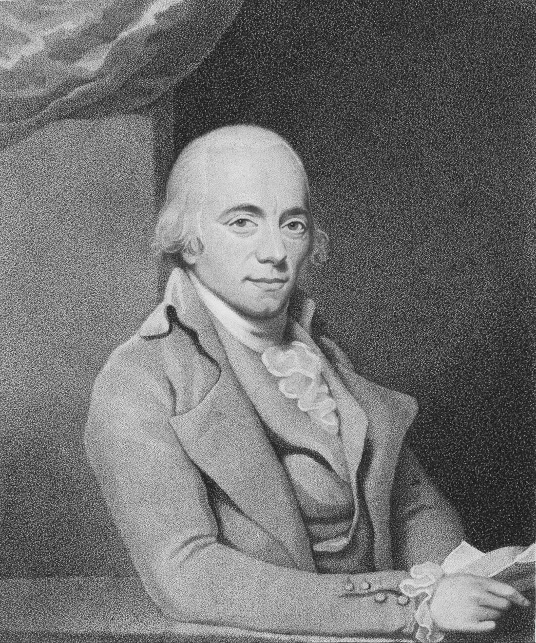 Depicted person: Muzio Clementi